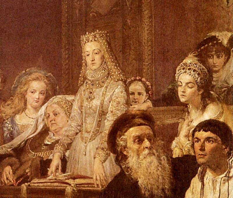 (?) Tęczyńska, Beata Kościelecka, Anna Jagiellonka, nieznana główka, Zofia Szydłowiecka, (?) Herburtówna. Poniżej Andrzej Frycz Modrzewski i chłop pańszczyźniany (fragment obrazu Unia Lubelska)